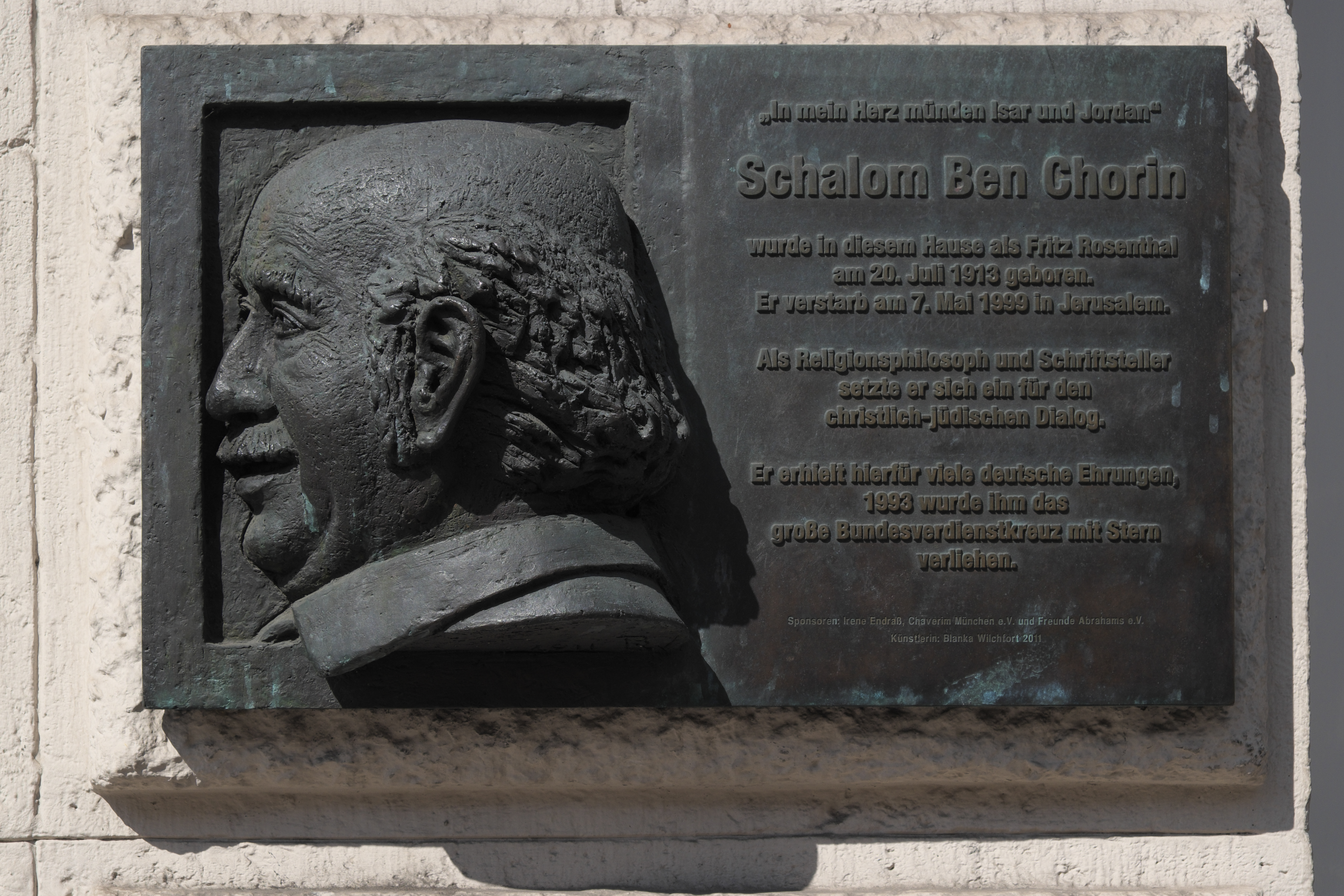 Mietshaus in der Zweibrückenstraße 8 in der Isarvorstadt im Stadtbezirk Ludwigsvorstadt-Isarvorstadt in München (Bayern/Deutschland), 1903 von Hans Hartl gebaut, Gedenktafel am Geburtshaus von Schalom Ben Chorin